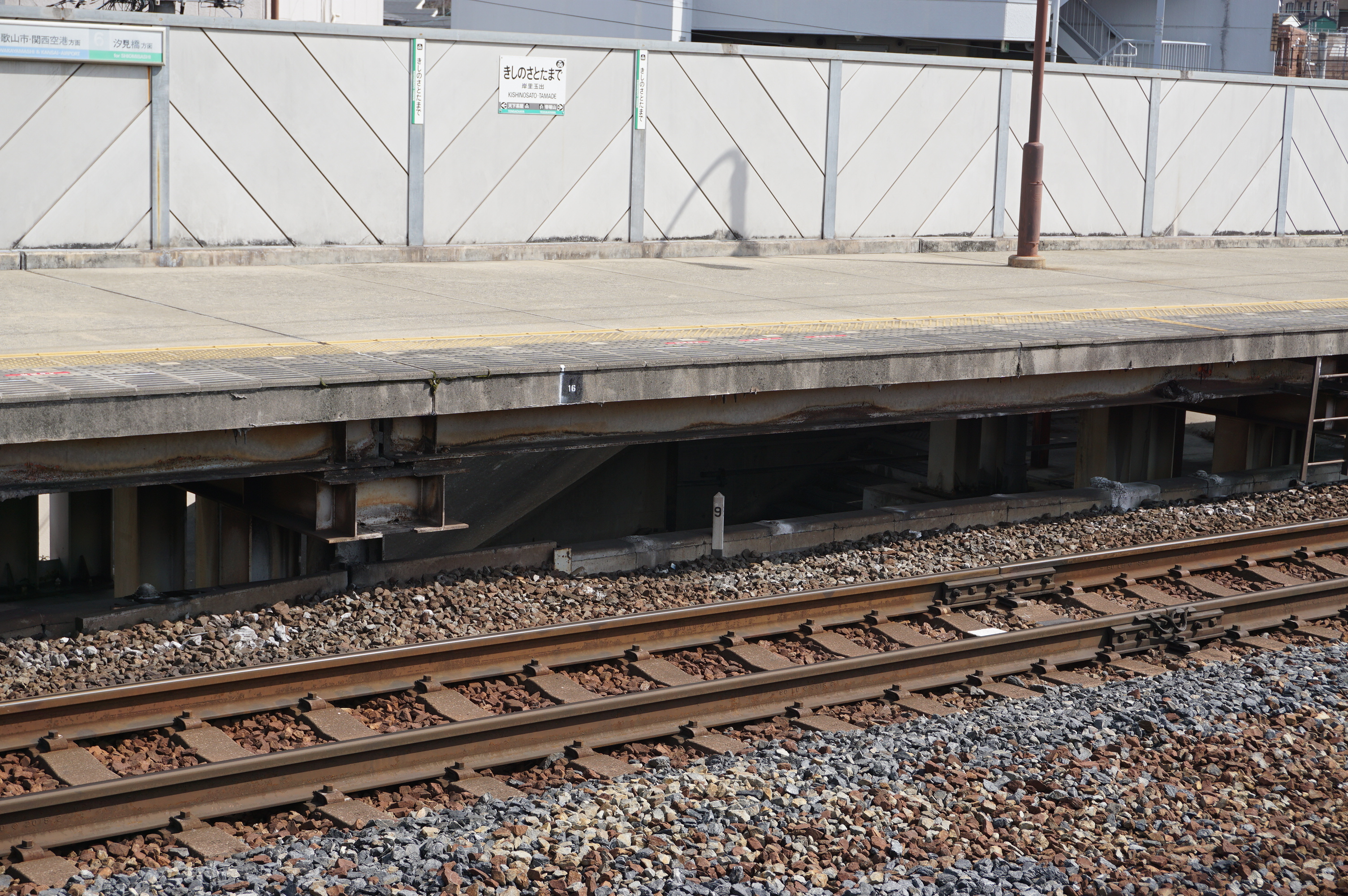 旧ホームに続いていた階段の跡 Sony ILCE-6000